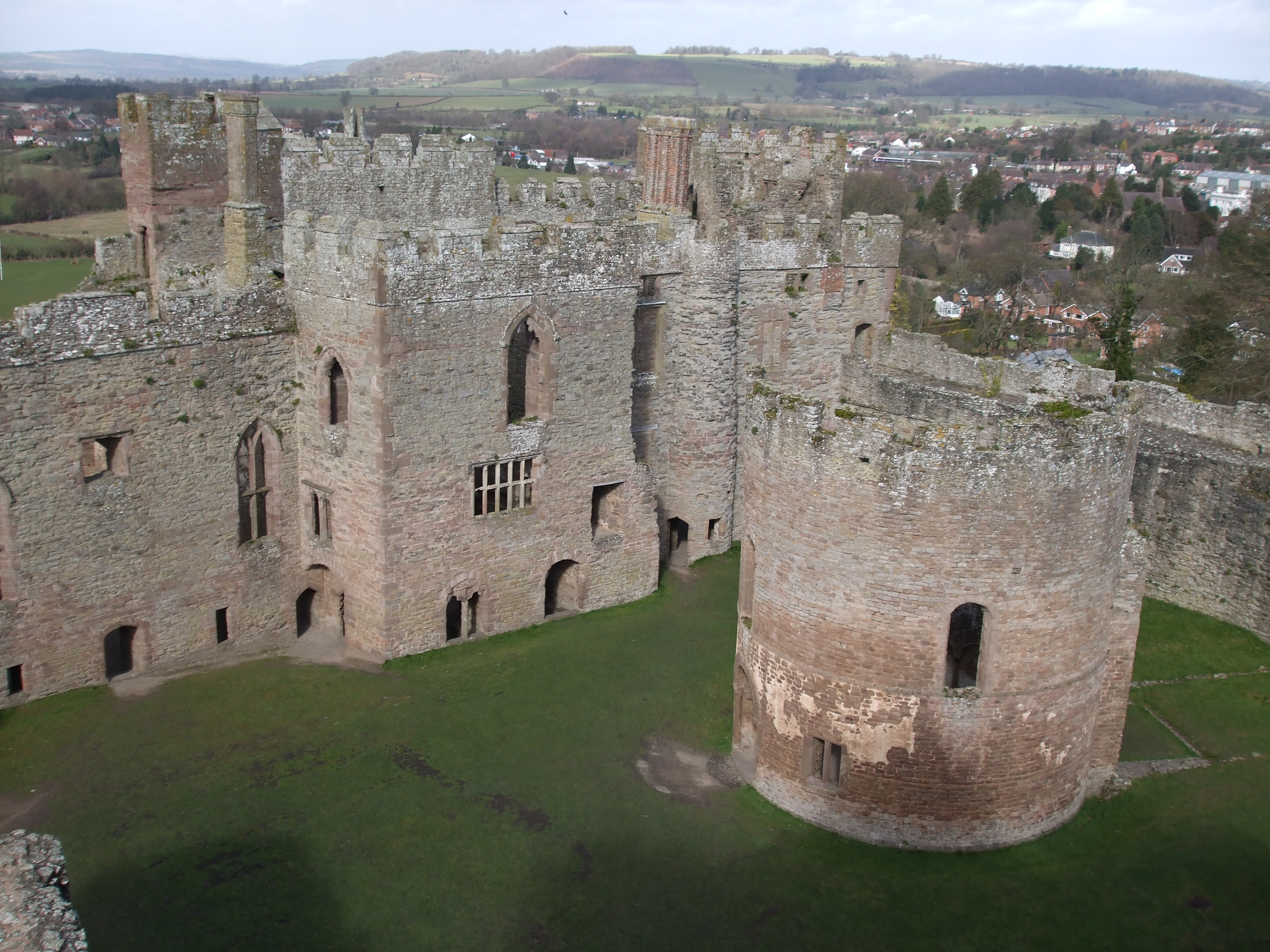 Zamek w Ludlow z widokiem na miasto.